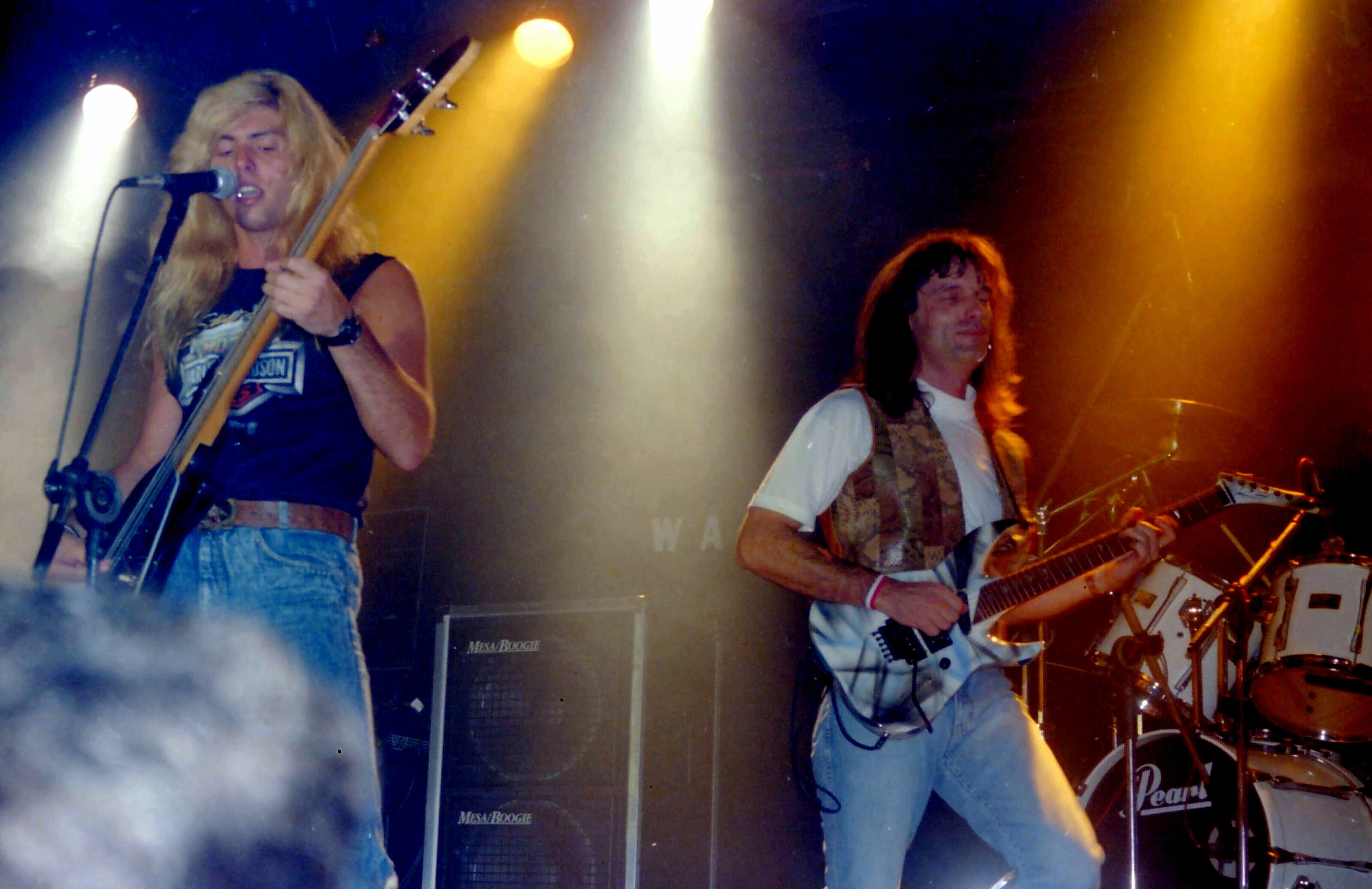 Show da Banda Taffo realizado no Dama Xoc em Agosto de 1989.